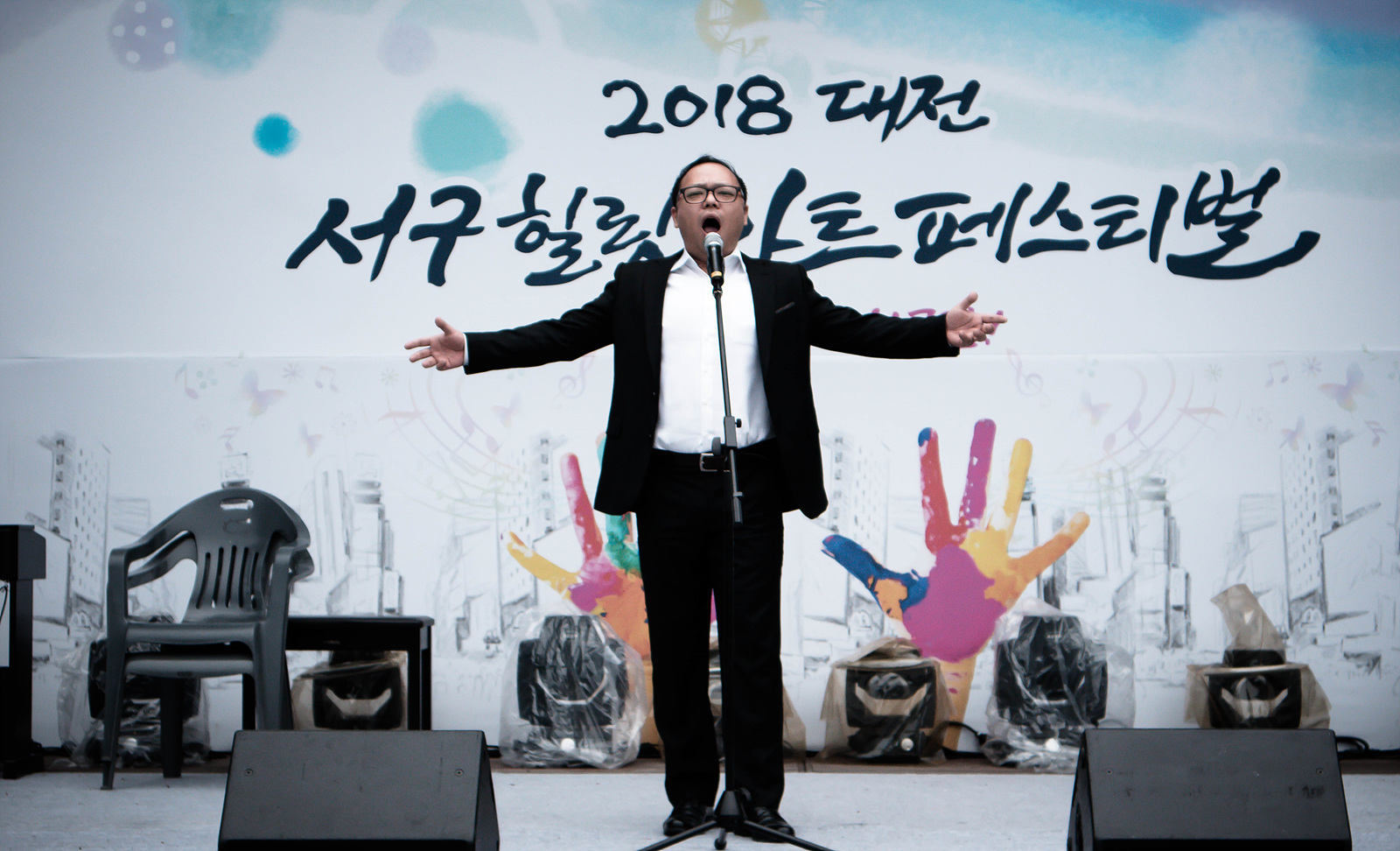 성악 독창입니다. 대전에서 아름다운 목소리를 내시는분이 있길래 찍어봤습니다.